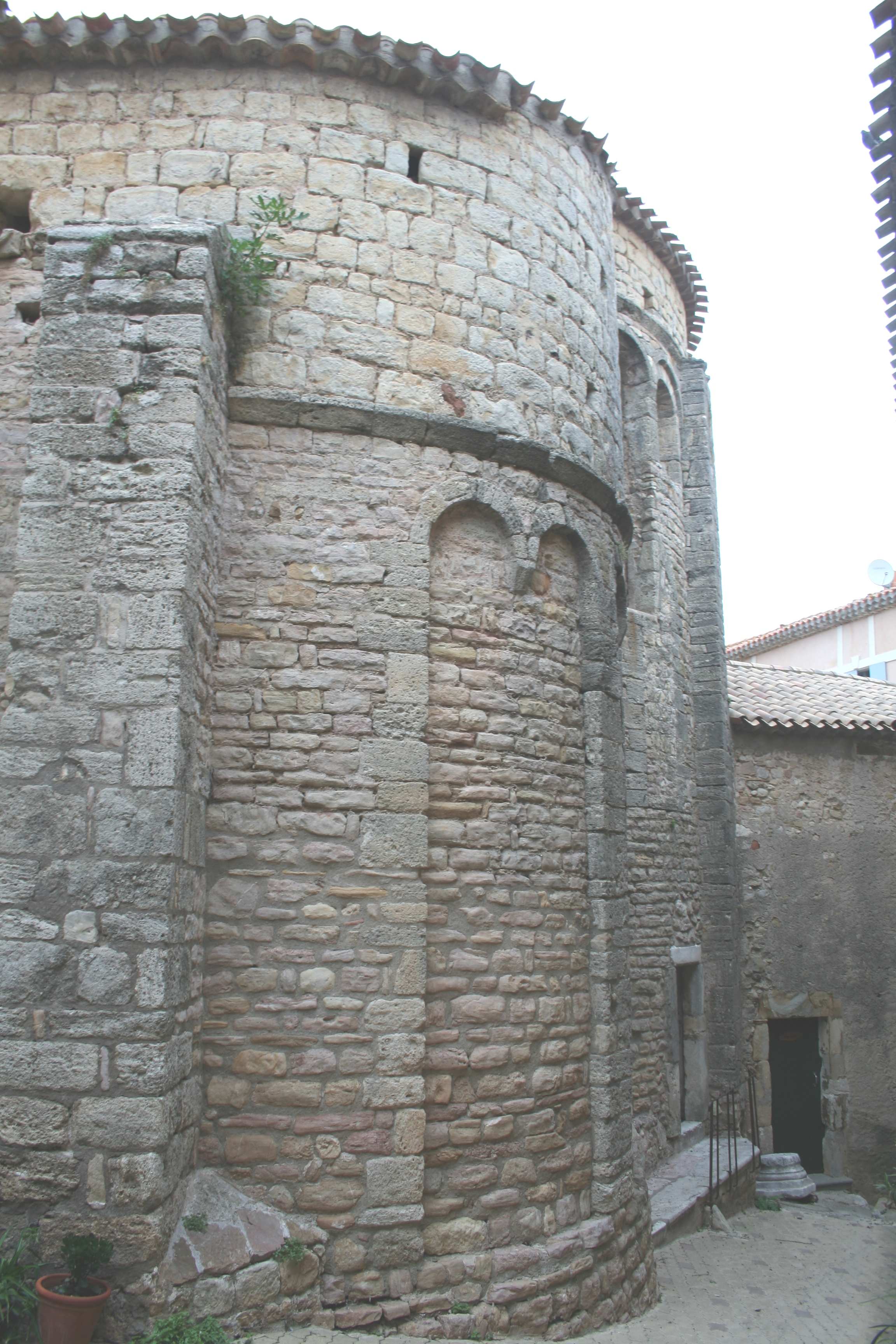 Quarante (Hérault) - abside de l'église Sainte-Marie